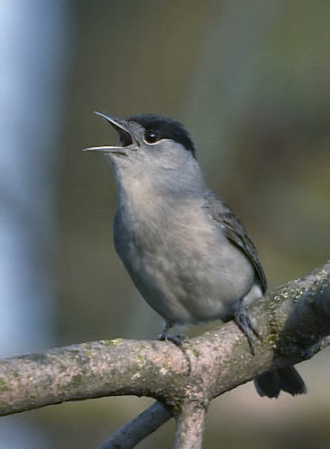 Sylvia atricapilla (Blackcap) ♂